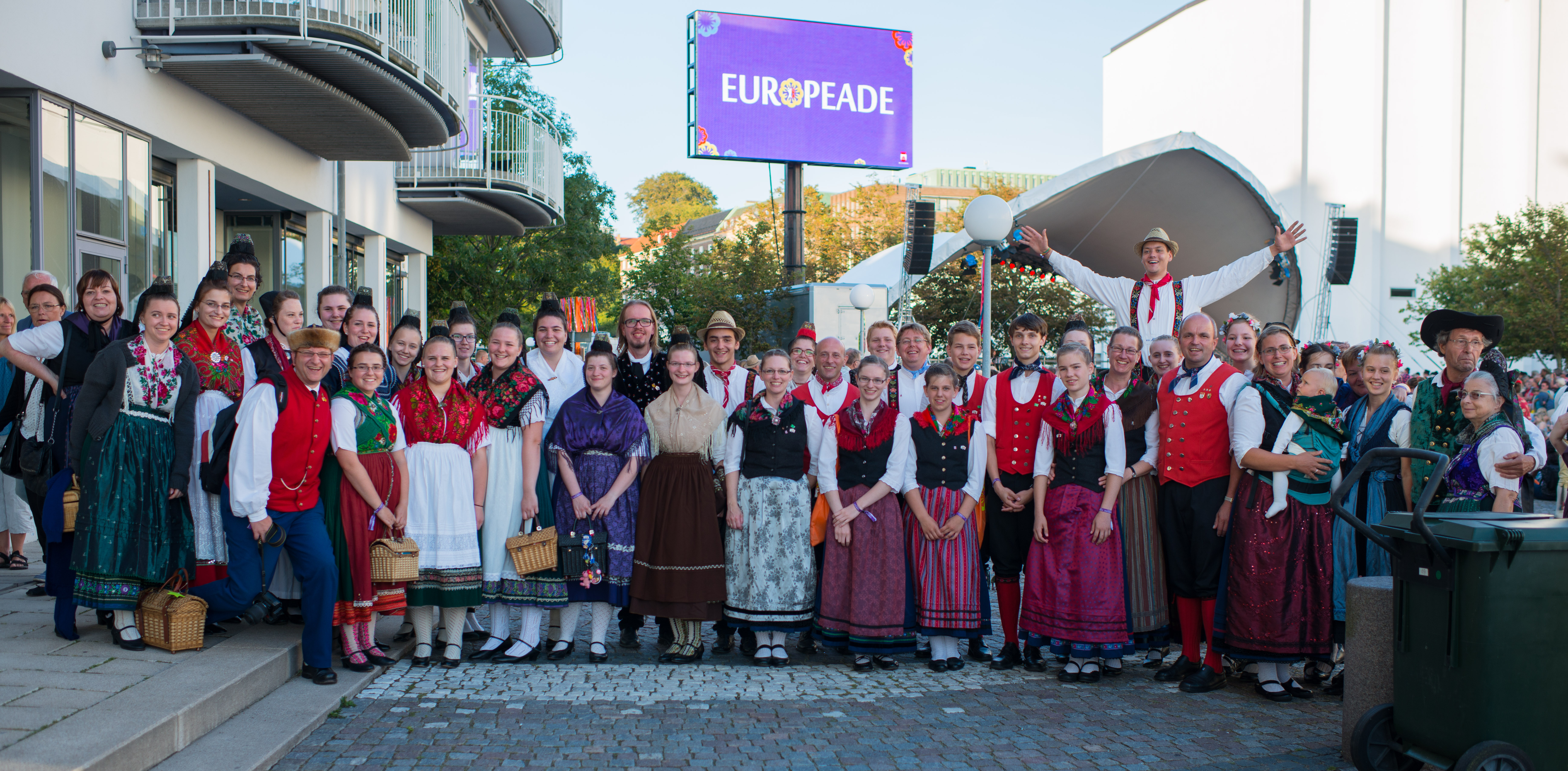 Europeade i Helsingborg